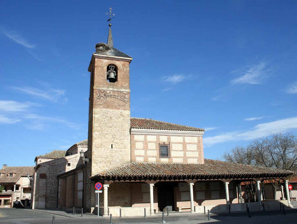 Iglesia de El Casar, municipio de Guadalajara, España.